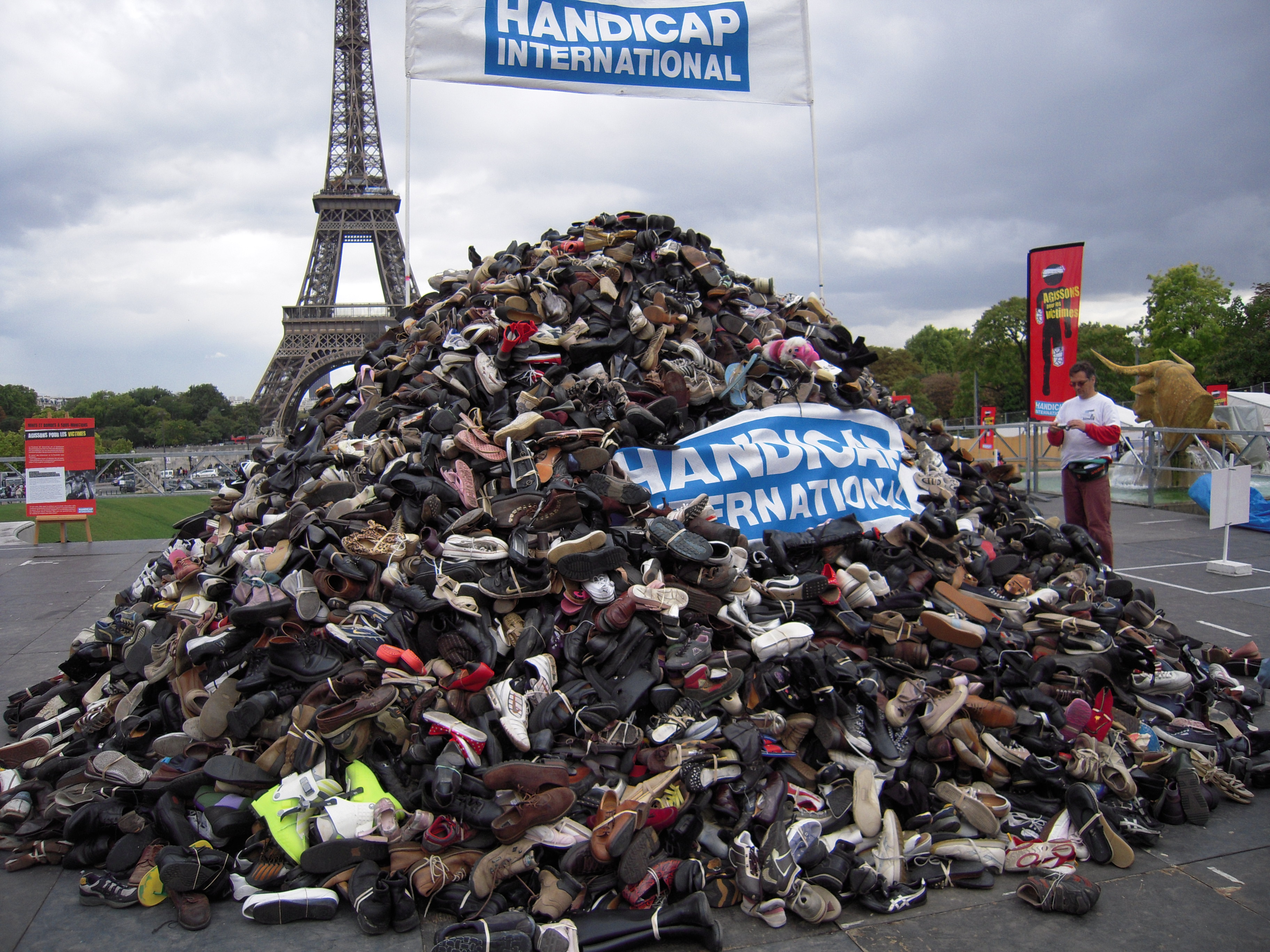 Pyramide de chaussures récoltées par Handicap International en faveur de la lutte contre les mines anti-personnel